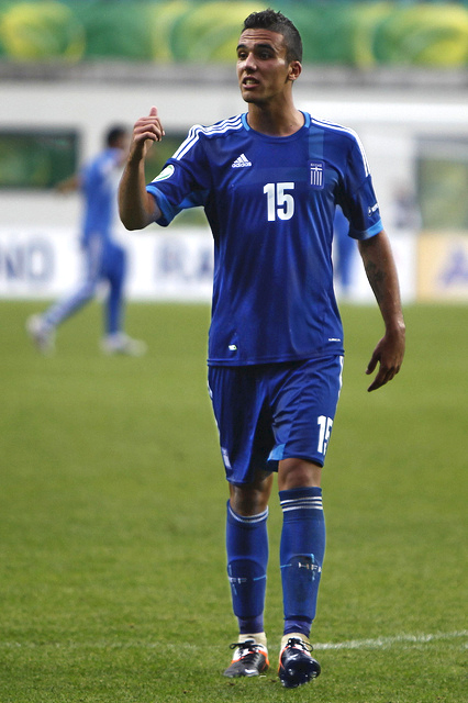 Dimitris Kourbelis en 2012